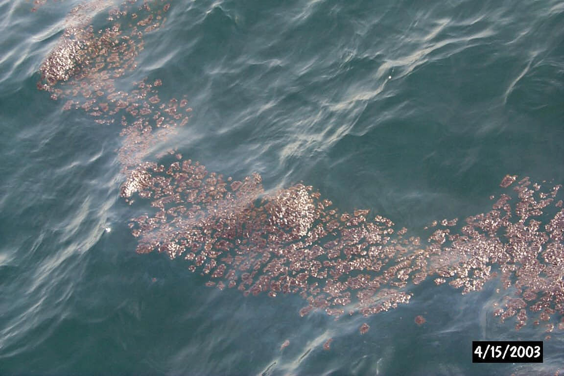 Hidrocarburo en el mar